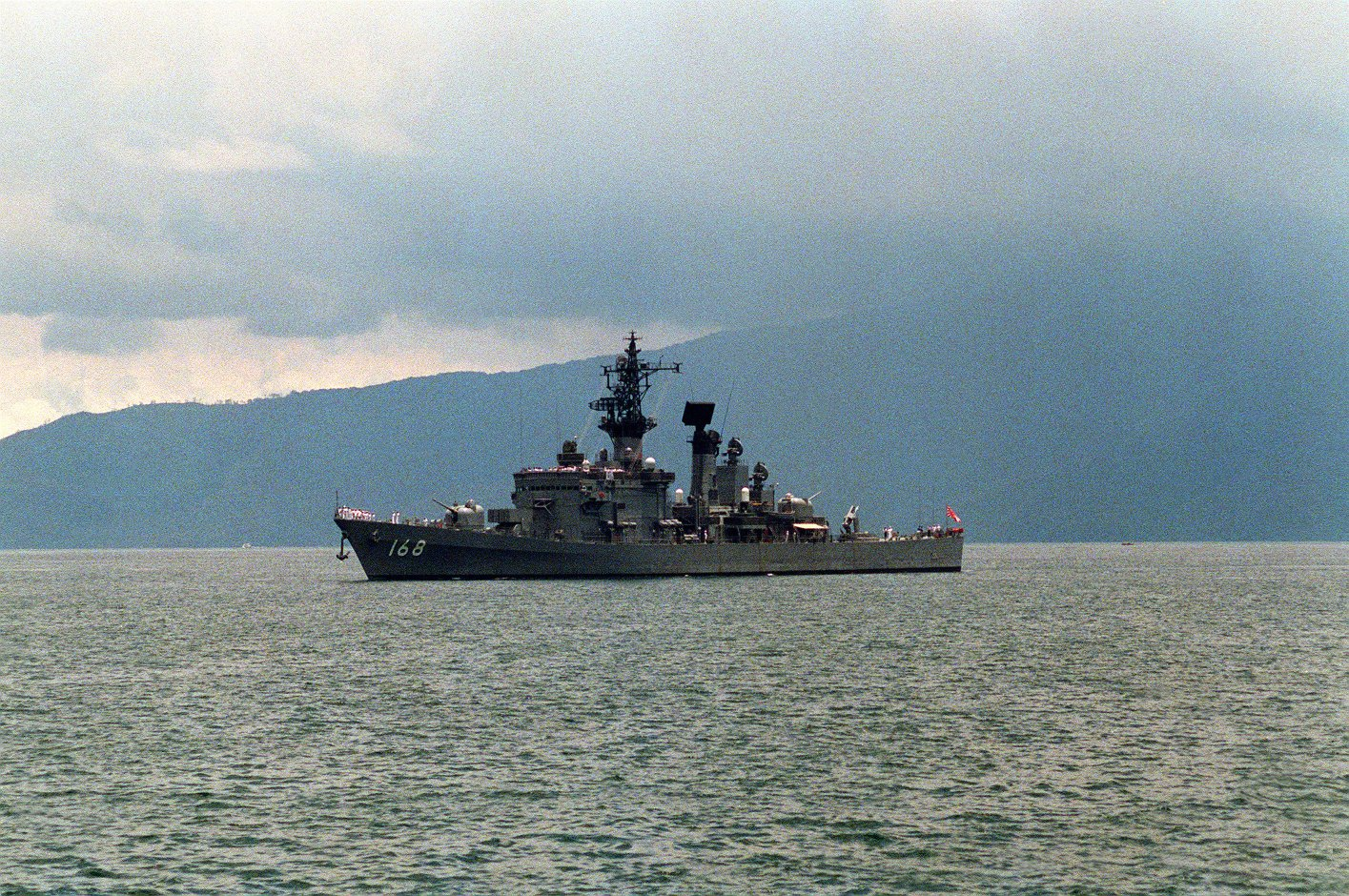 JDS Tachikaze (DD-168) at anchor, Luzon.